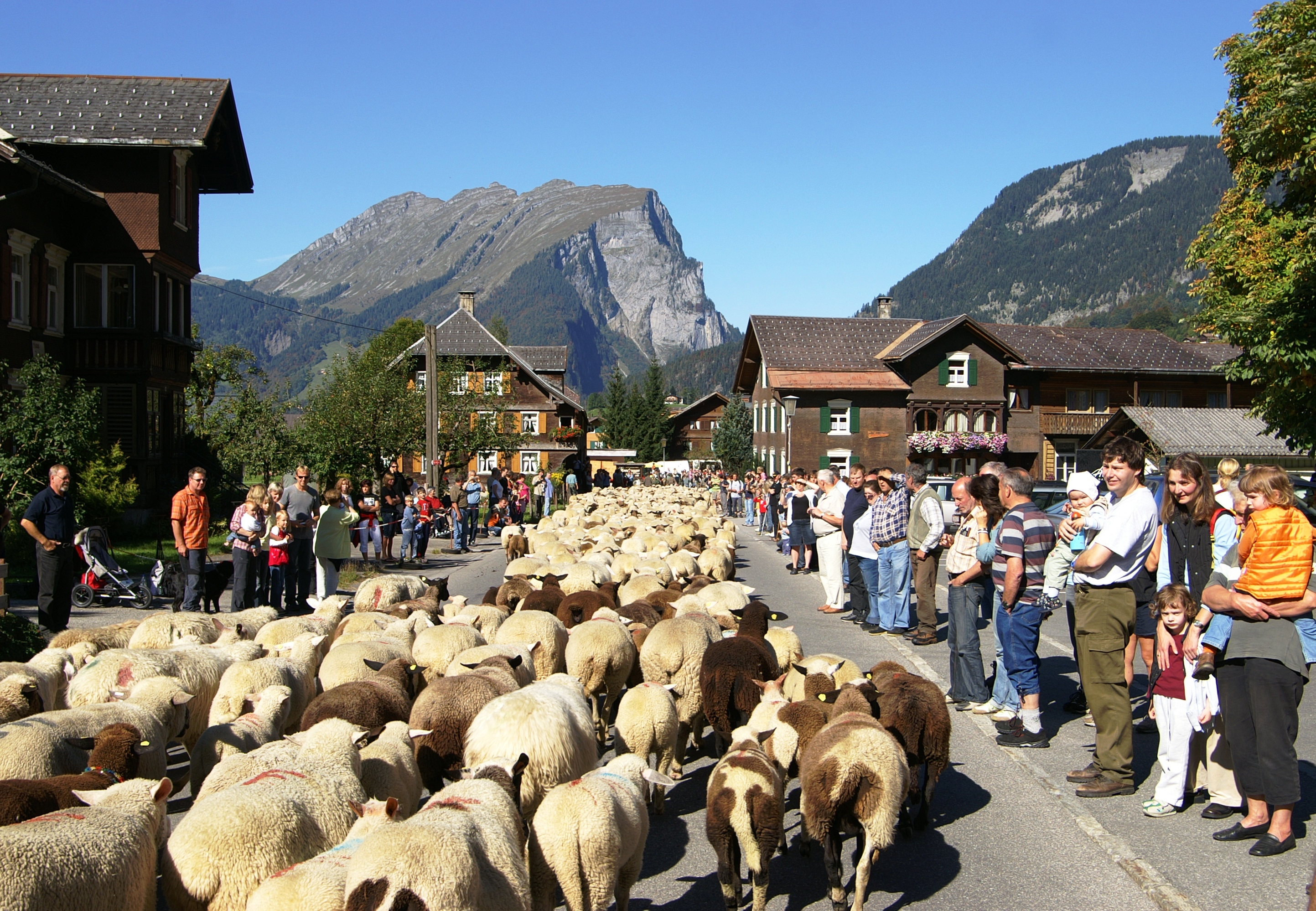 Almabtrieb der Schafe vom Schröcken nach Schoppernau im Bregenzerwald Dieses Highlight wird mit dem “Veahmätle” (kleiner Viehmarkt) gefeiert.